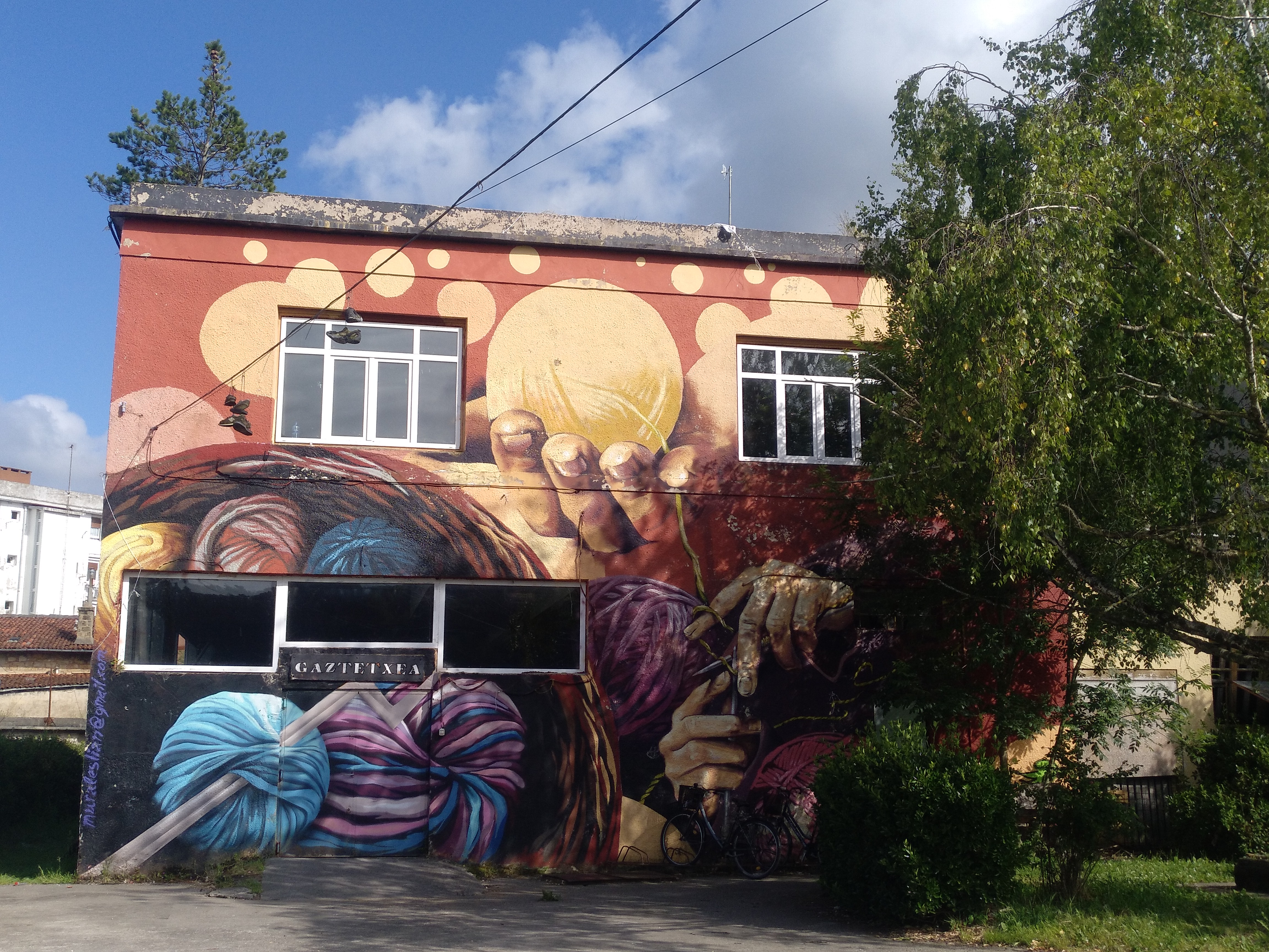 Putzuzulo gaztetxea Zarautzen